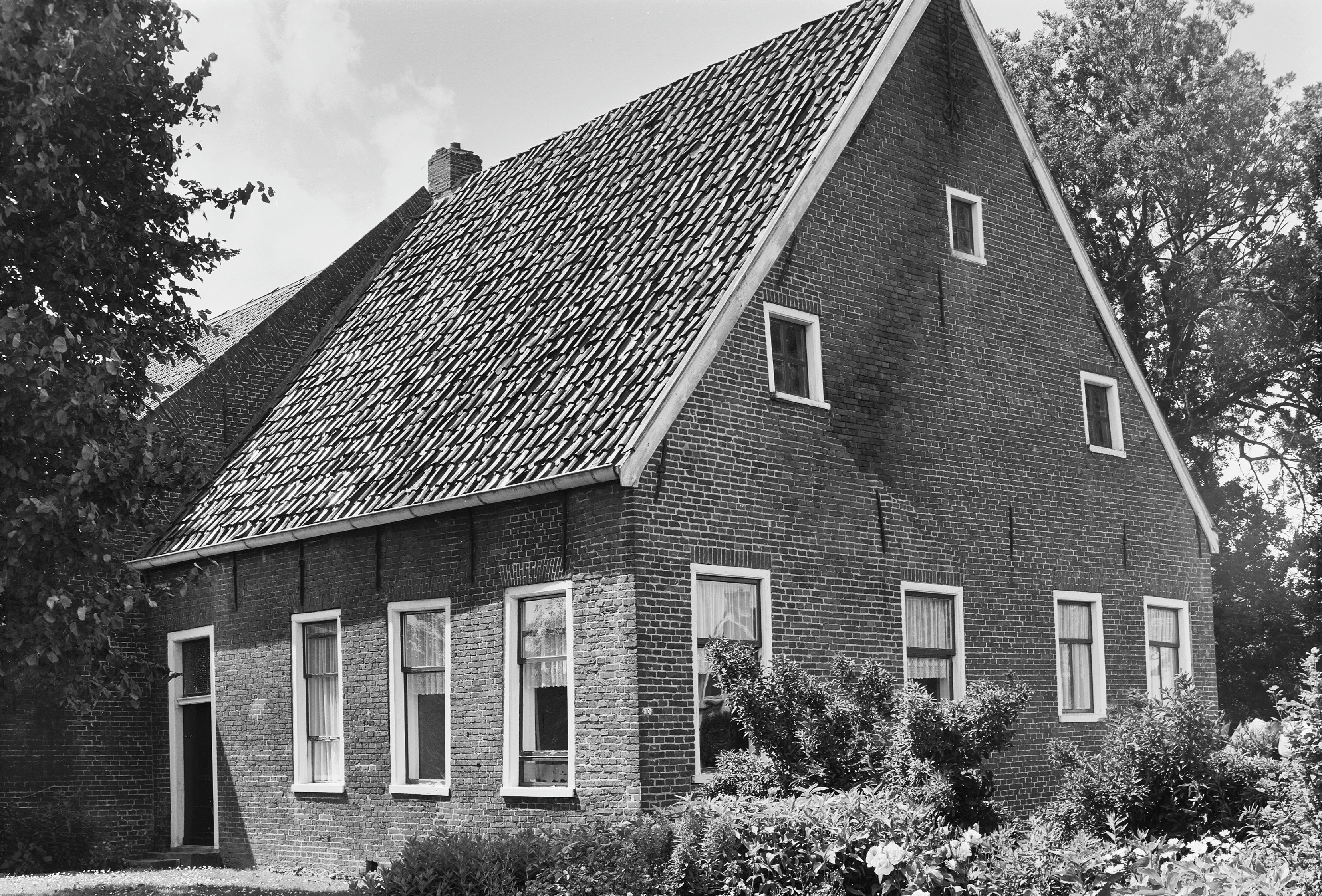 Kremer Hoeve", aanzicht